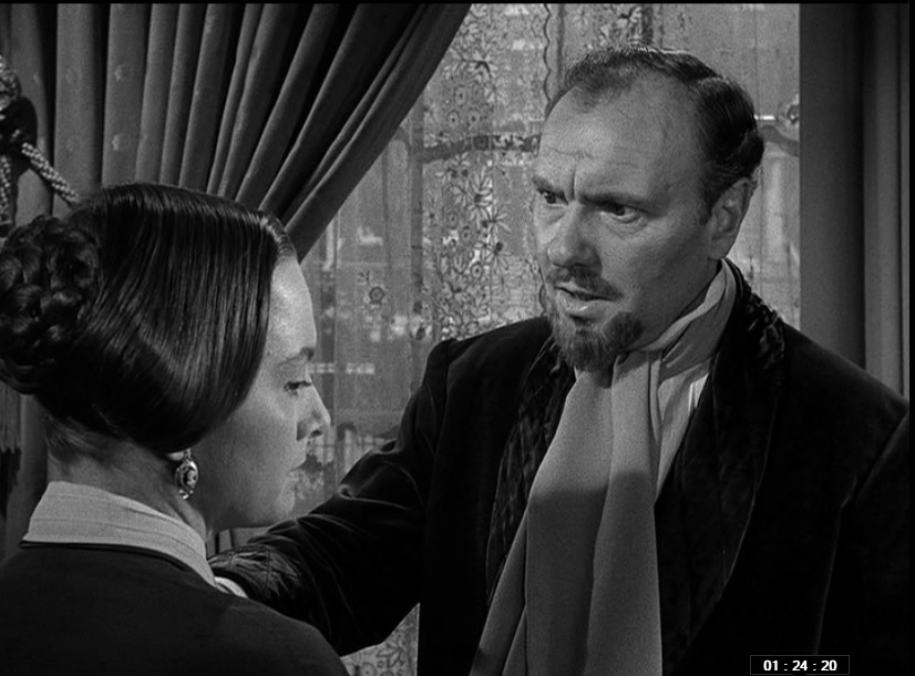 Le docteur Sloper, père de Catherine Sloper (Image extraite du film de William Wyler "L'héritière").